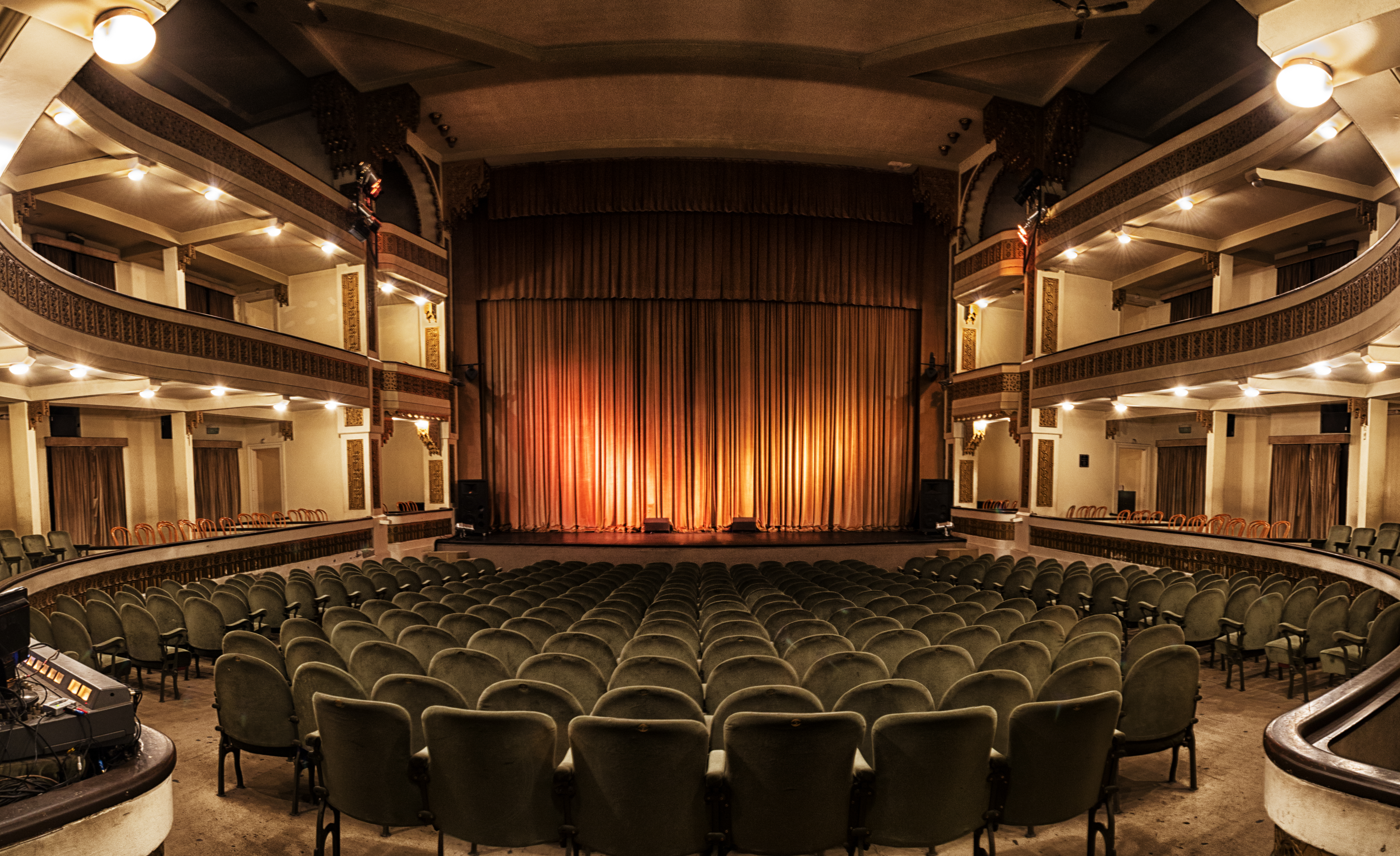 Interior del Teatro Colón de Mar del Plata